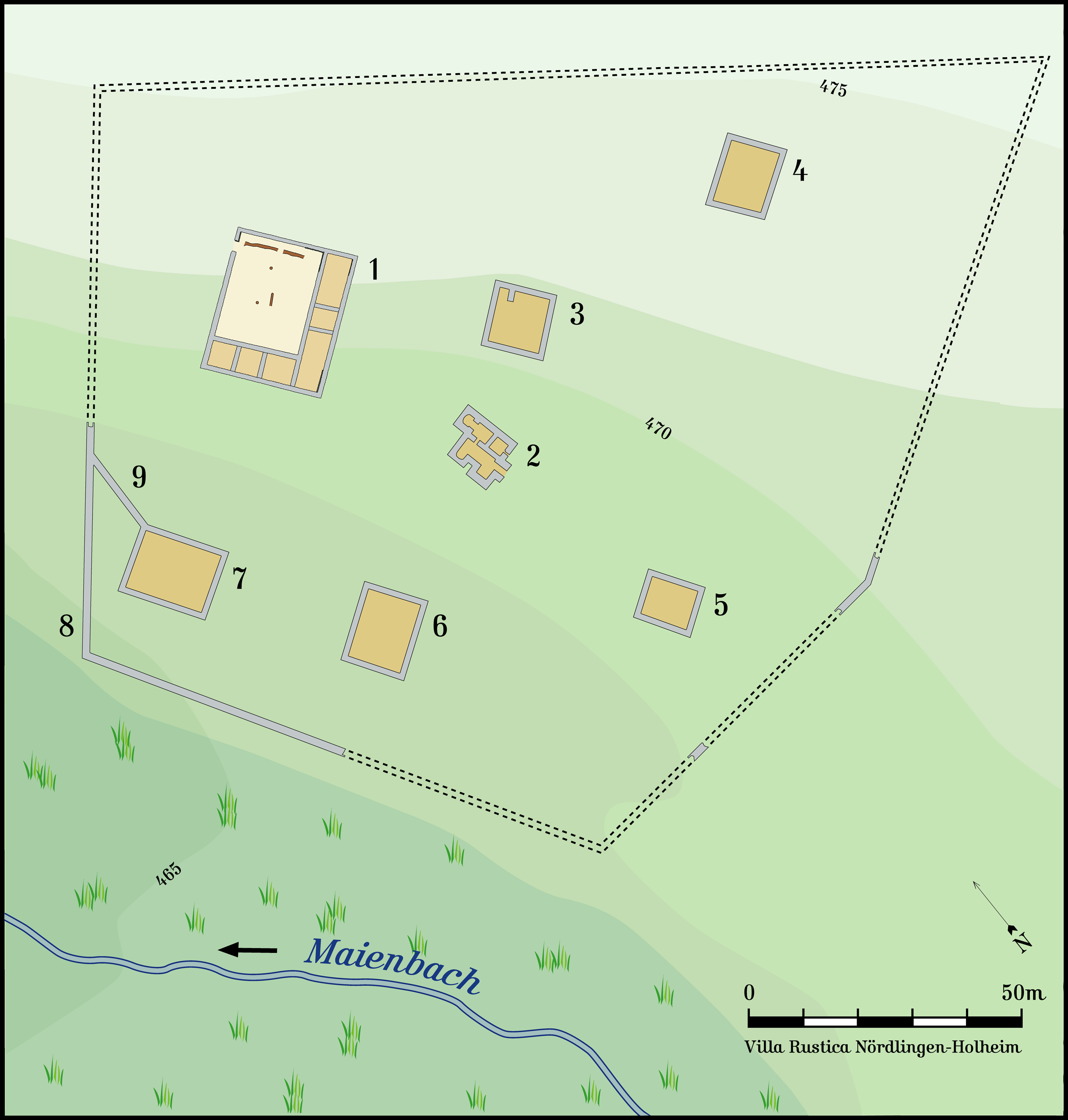 Lageplan der Villa Rustica Nördlingen-Holheim in Bayern. Quelle: Jochen Garbsch: Holheim – Römischer Gutshof (villa rustica). In: Das römische Germanien aus der Luft. 2. Auflage. Gustav Lübbe Verlag, Bergisch-Gladbach 1983, ISBN 3-7857-0298-1, S. 37; Rainer Christlein, Otto Braasch: Das unterirdische Bayern – 7000 Jahre Geschichte und Archäologie im Luftbild. 3. Auflage. Konrad Theiß Verlag, Stuttgart 1998, ISBN 3-8062-0855-7, S. 202 sowie Kartenmaterial zum Eintragen der Höhenlinien.